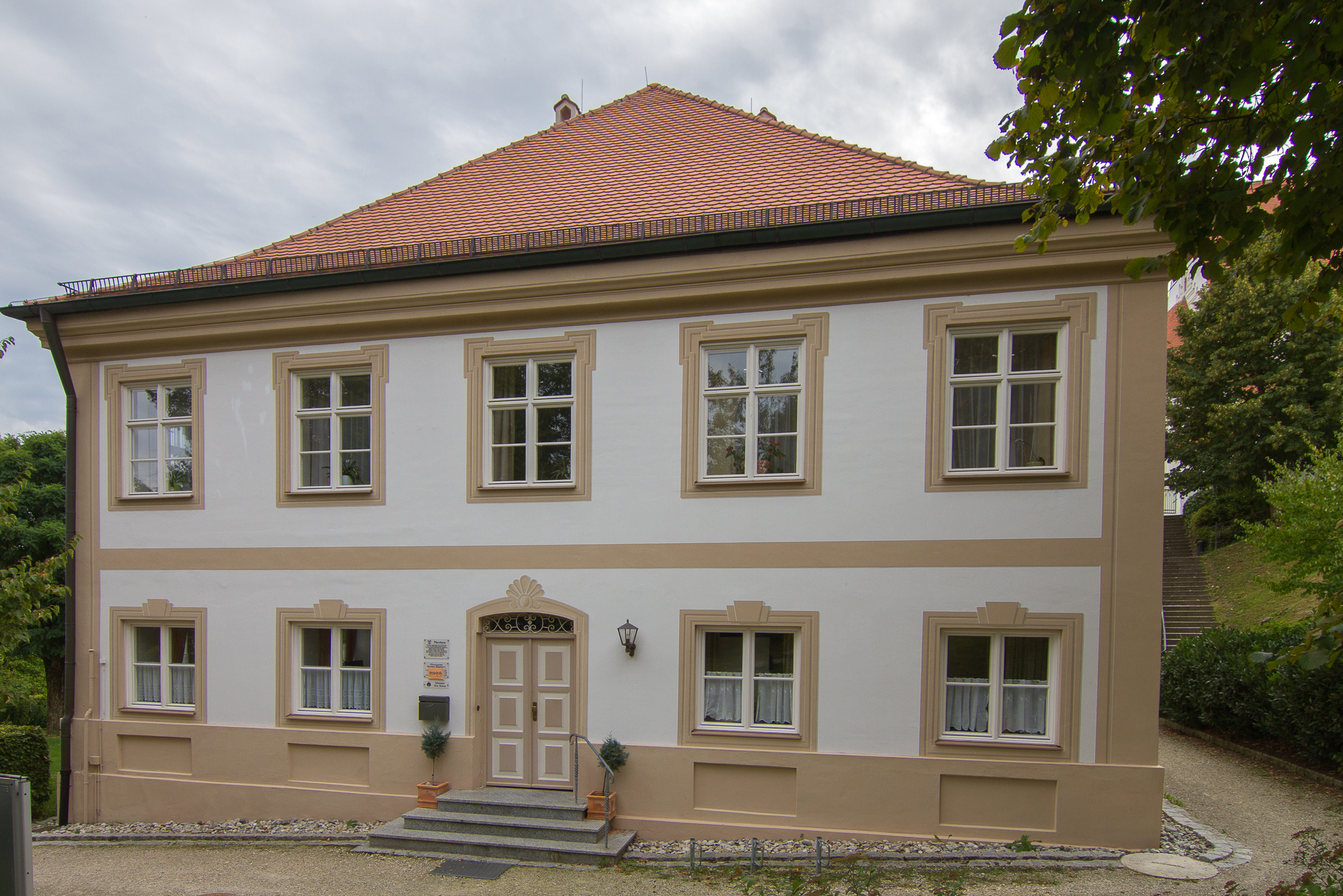 Pfarrhaus ehem. Propsteigebäude, 2. Hälfte 18. JahrhundertThis is a photograph of an architectural monument.